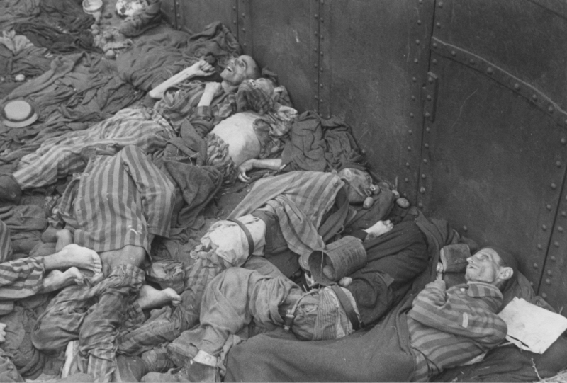 Foto 57814: Corpses in a death train in Dachau